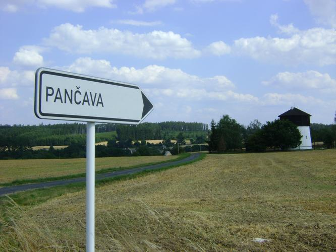 Pohled z hlavní komunikace - nad osadou Pančava. V dáli Svrčov. FOTO: VRZAL JIŘÍ